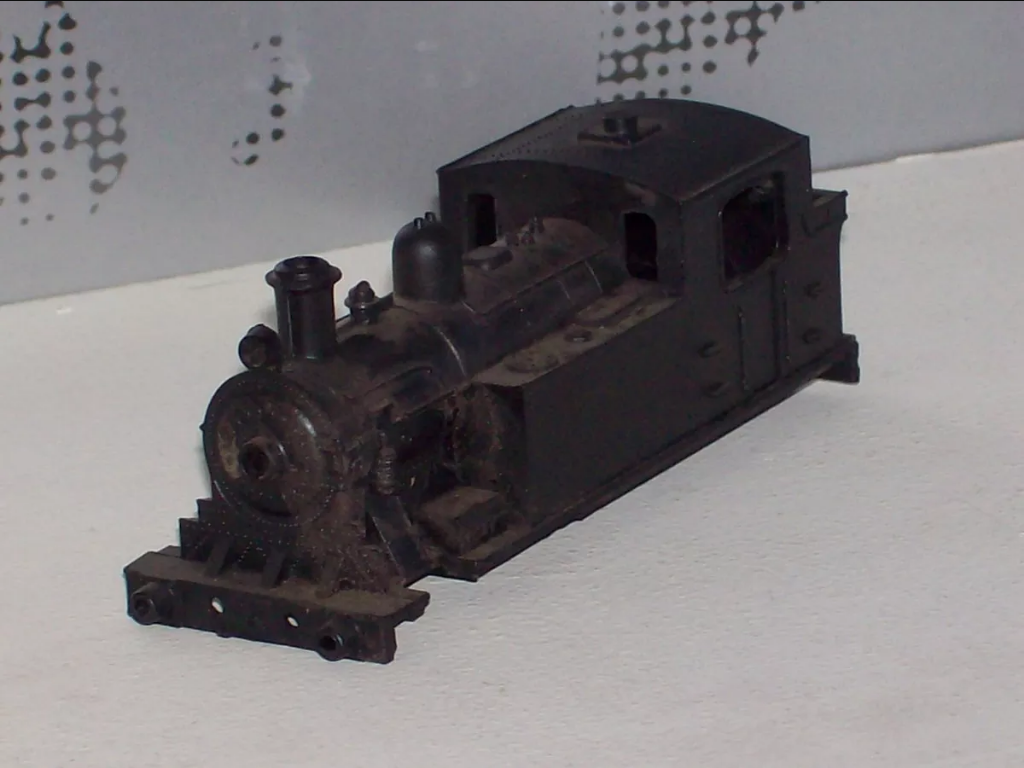 Carroceria de locomotora pilota a vapor marca Szaval